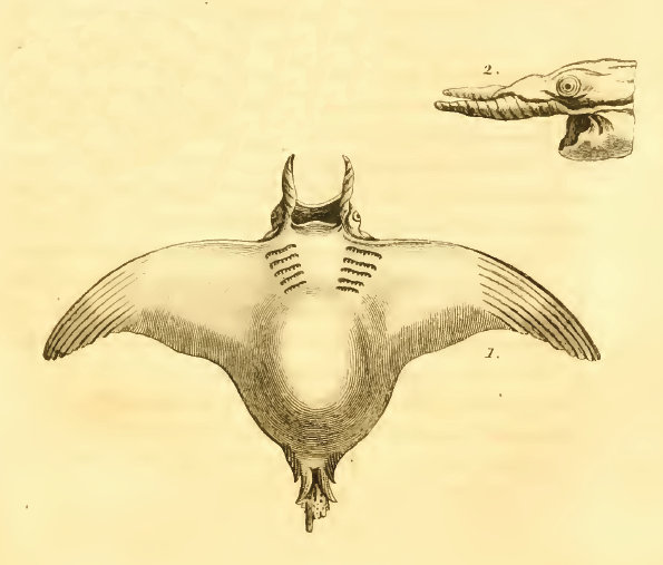 Вид скатов рода мобул Mobula mobular syn. Raia fabroniana